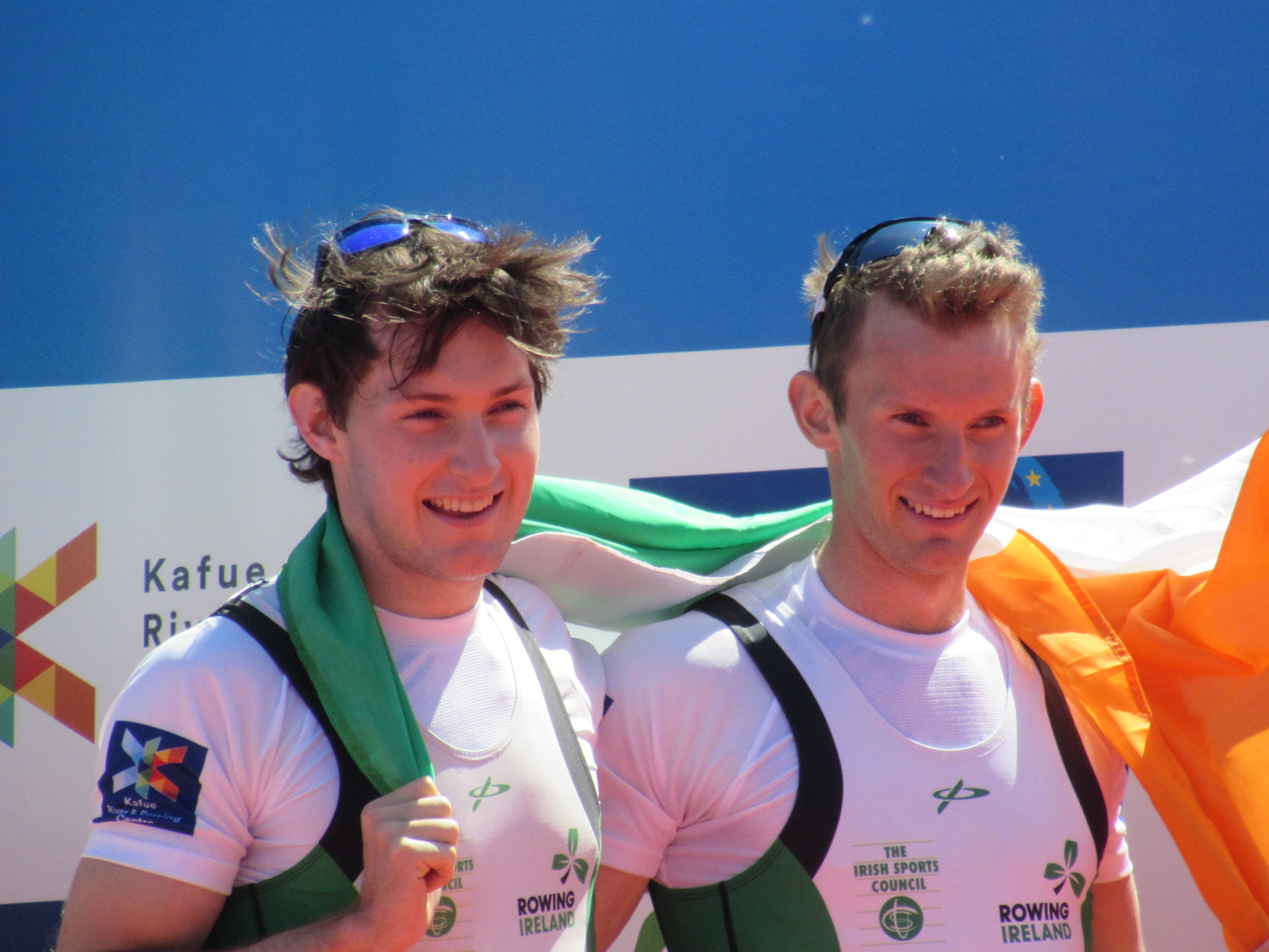 Gary O’Donovan, Paul O’Donovan, Ruder-EM 2016